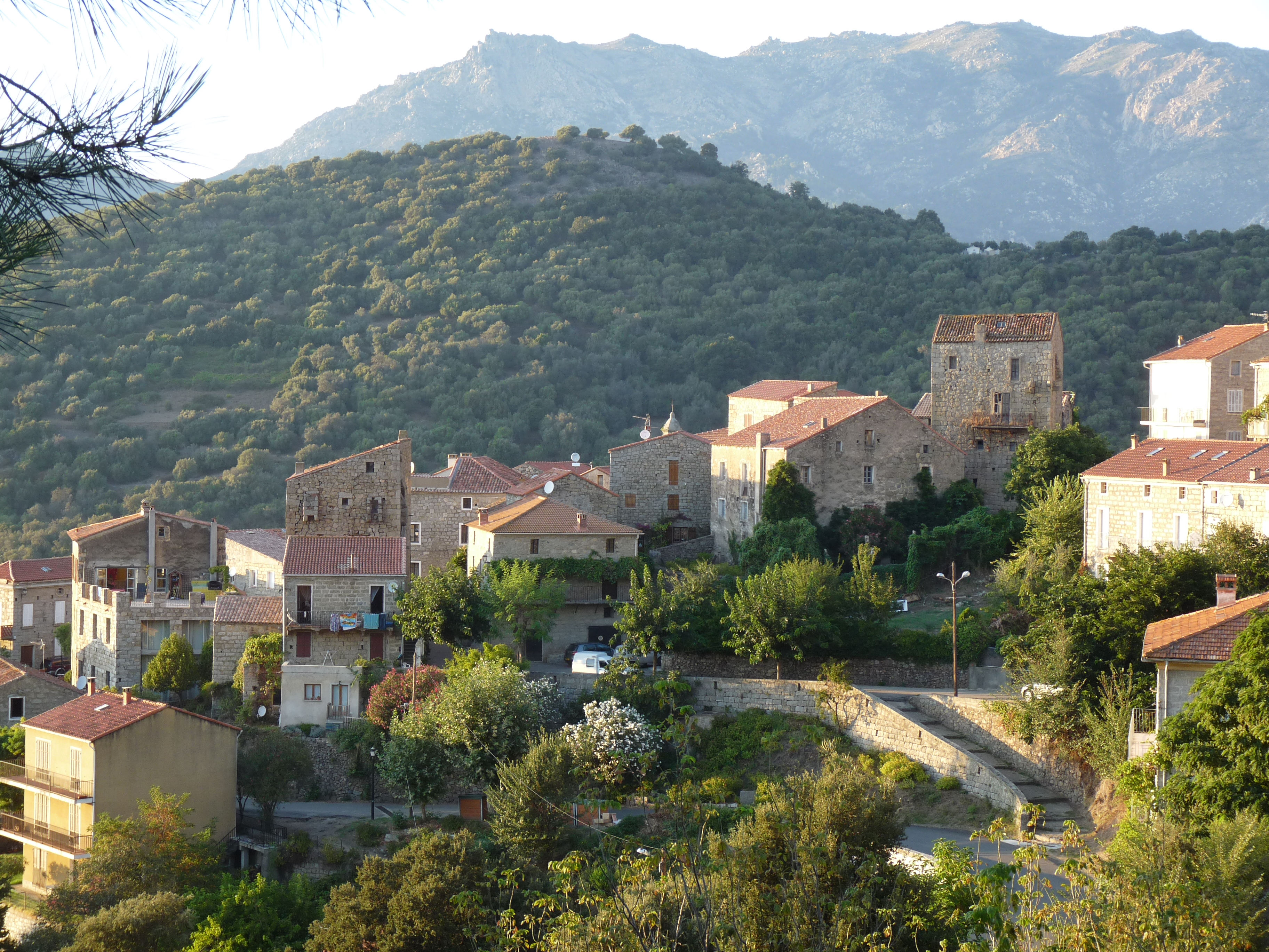 Cette rivalité sur fond de vendetta a inspiré à Mérimée la nouvelle Colomba. La tour de Colomba est reconnaissable à son machicoulis, la Tour Durazzo, la plus en hauteur, à son balcon. .